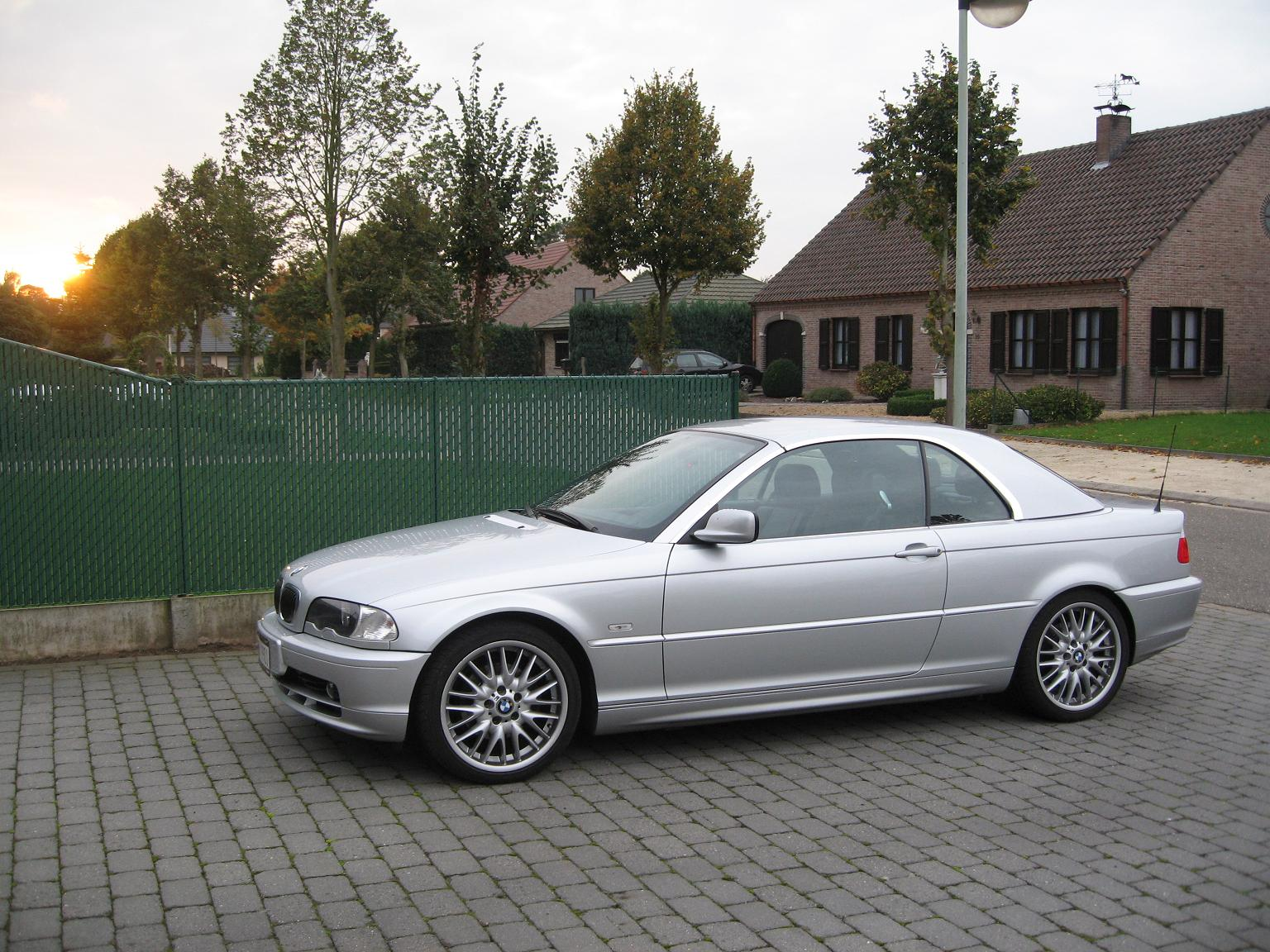 BMW E46 Cabrio